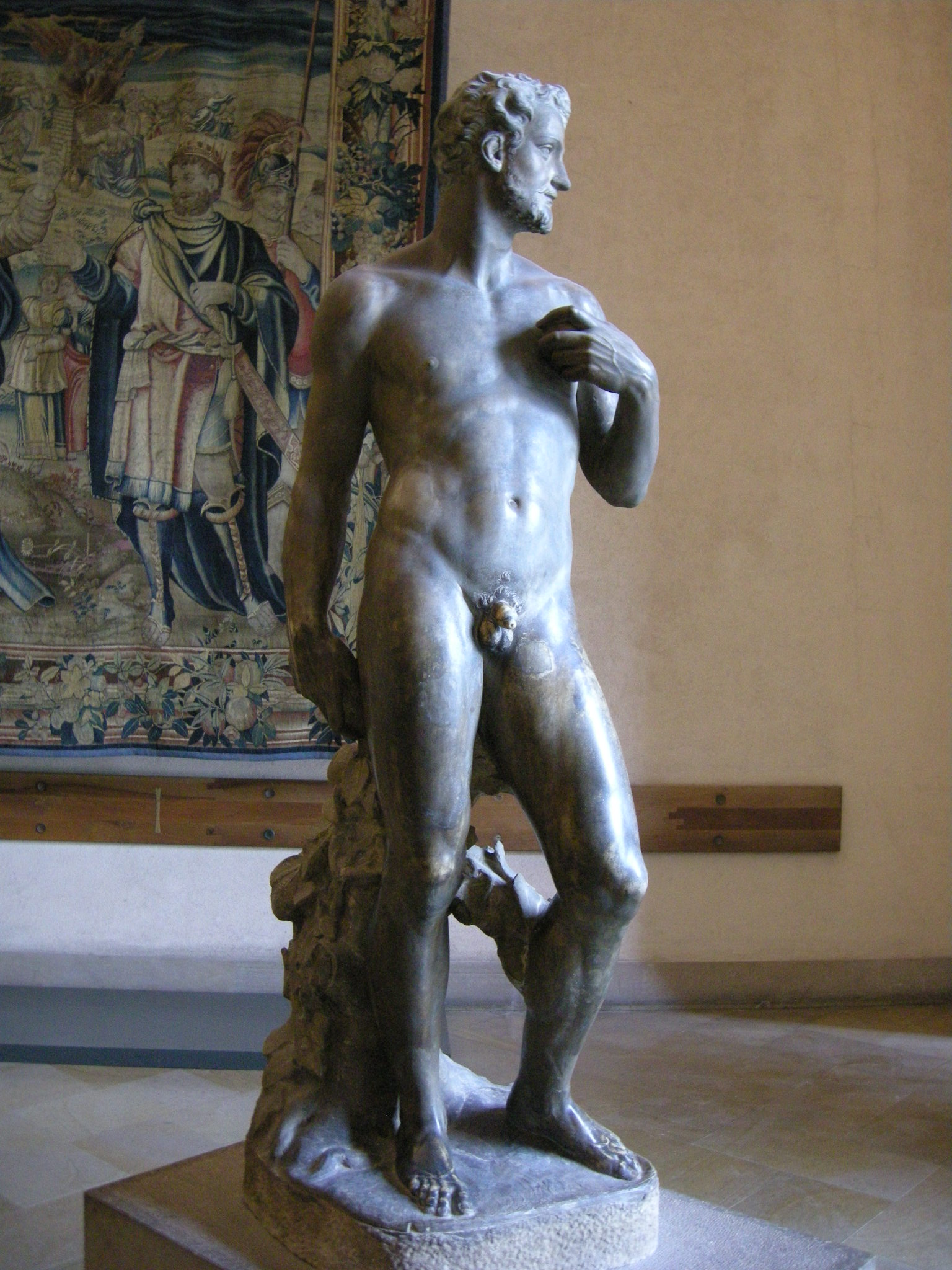 Adamo by Stoldo Lorenzi